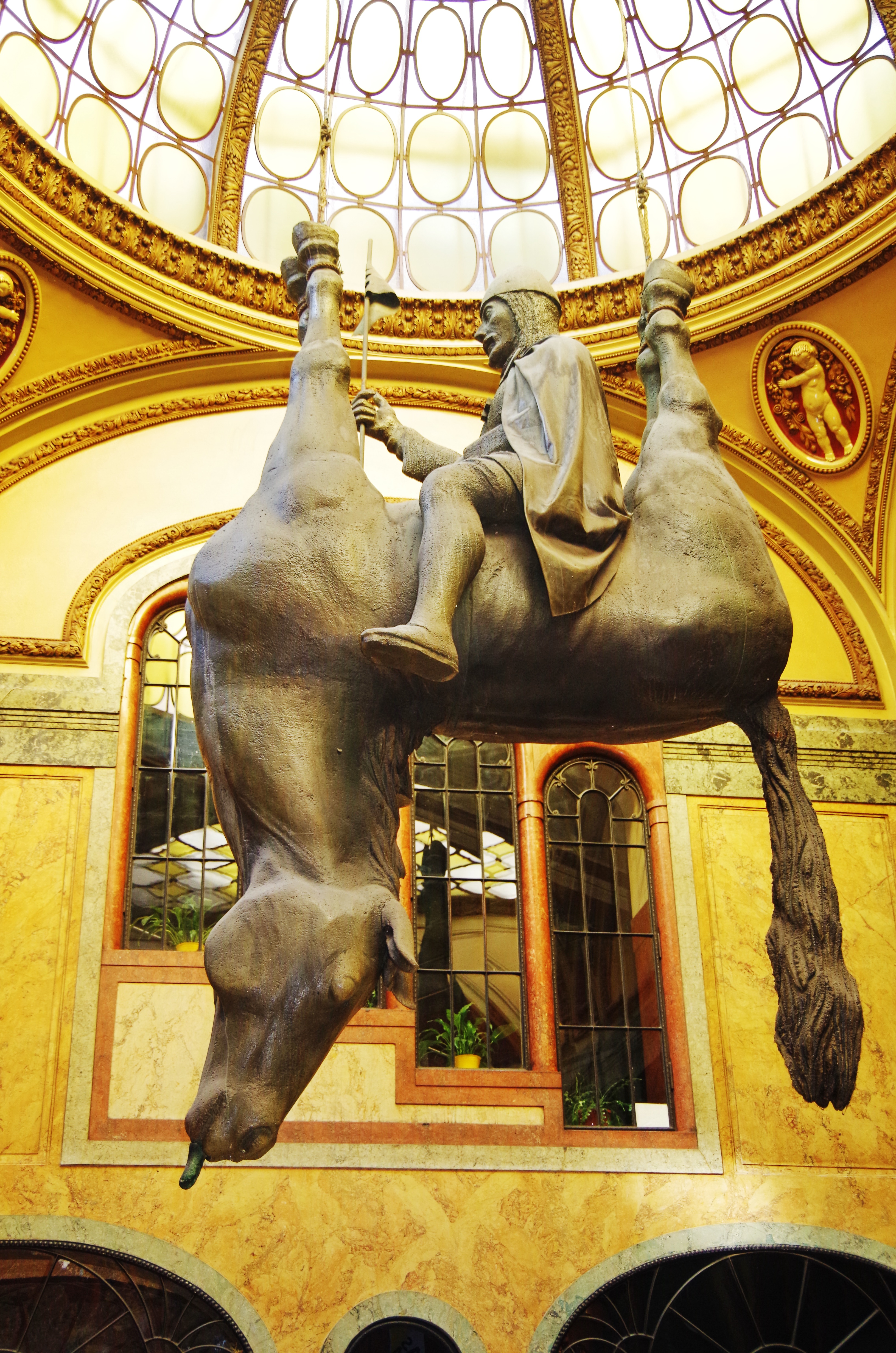 König Wenzel, Skulptur von David Cerny, Lercerna-Passage